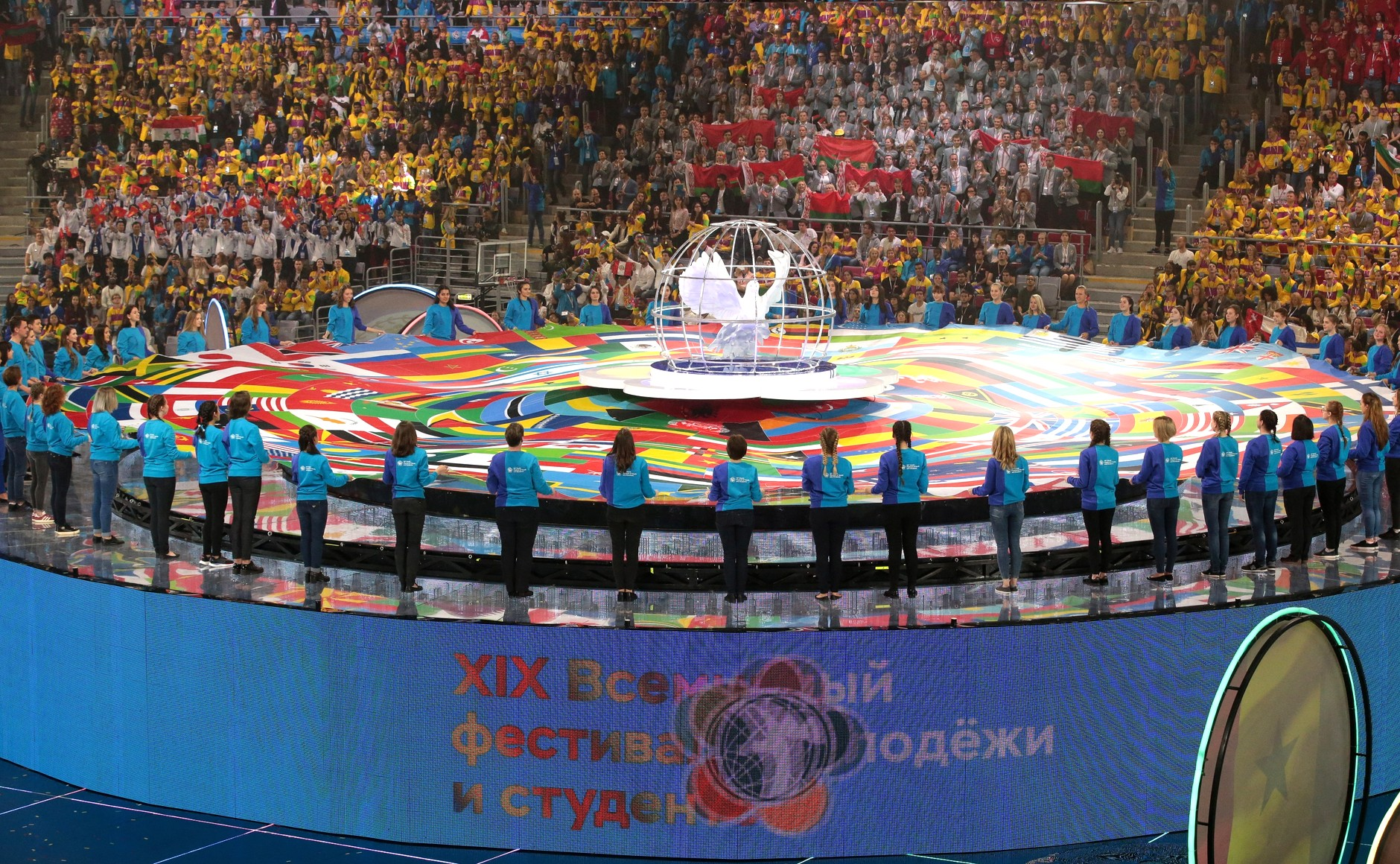 Церемония открытия XIX Всемирного фестиваля молодежи и студентов